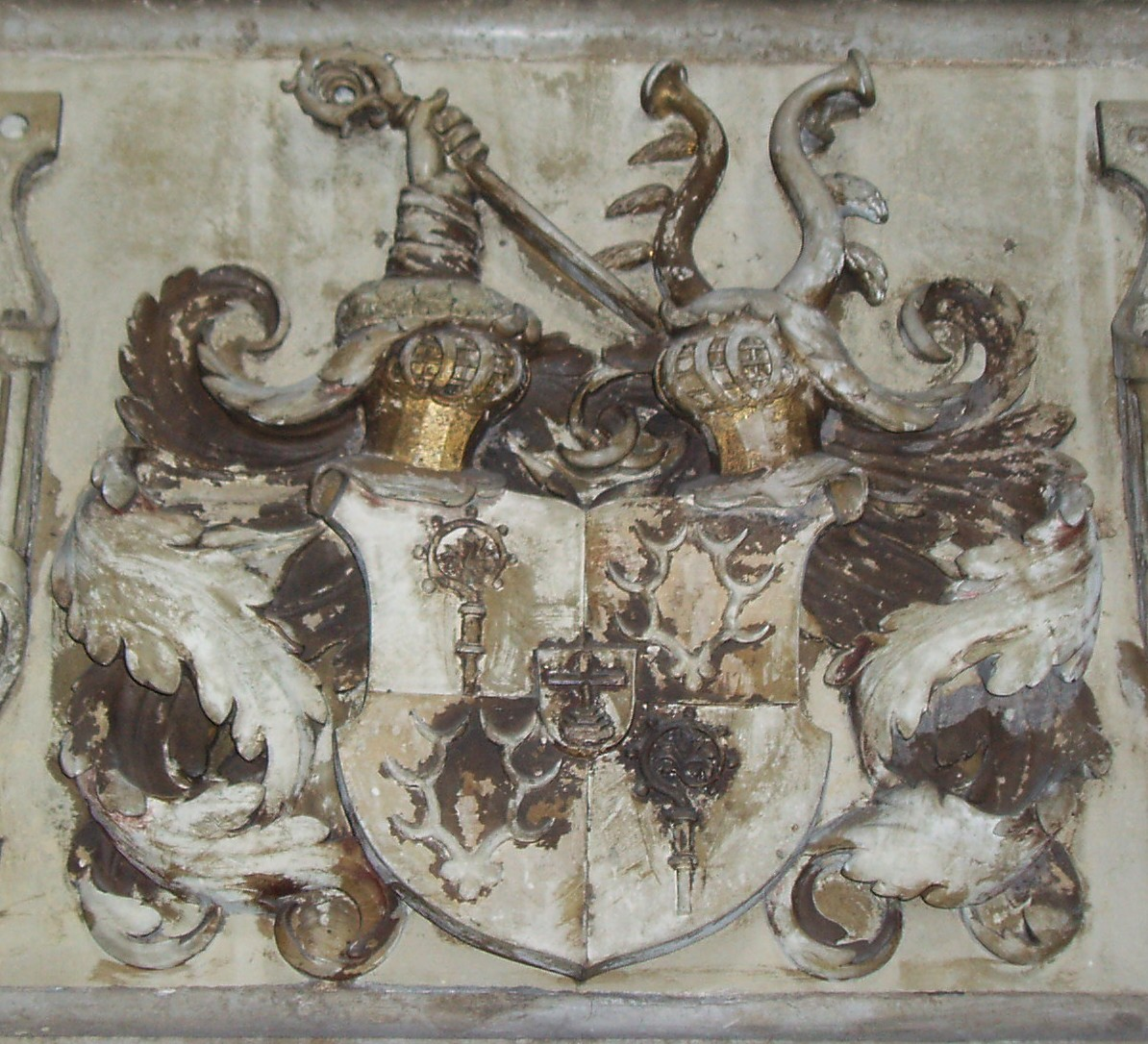 Bischofswappen Eberhard II. von Hirnheim an seinem Epitaph im Eichstätter Dom